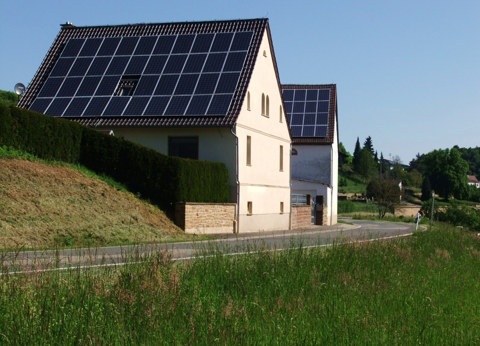 Windhof